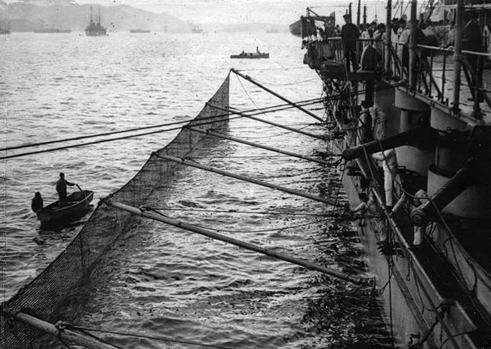 Une vue de Salamine Kerastini, le cuirassé Provence (1er – 9 janvier 1917) mise en place du filet Bullivant anti-torpille, prise par la Section photographique du corps d'armé.